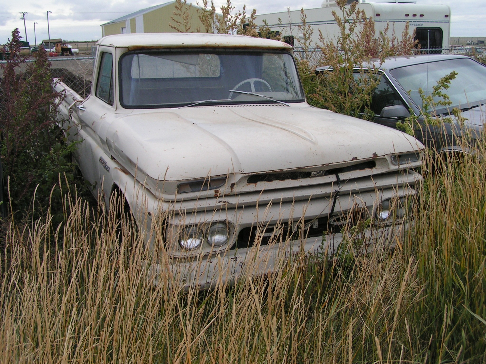 GMC Truck